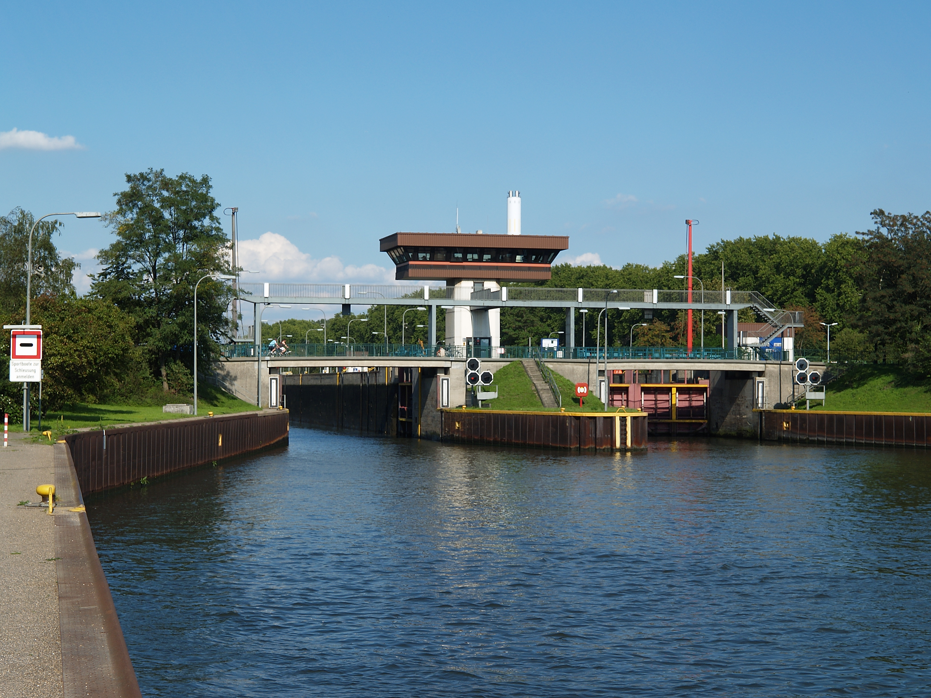 Unterhaupt der Schleusengruppe Oberhausen am Rhein-Herne-Kanal in Oberhausen, Ansicht von Westen